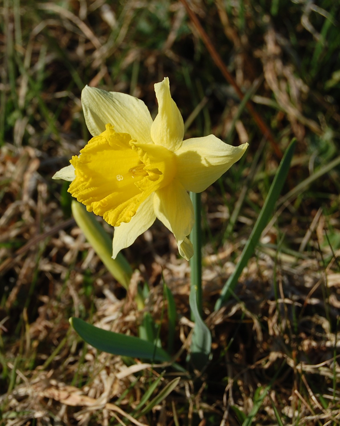 Jonquille (Narcissus pseudonarcissus) dans un pré (Le Tholy, Vosges, France)